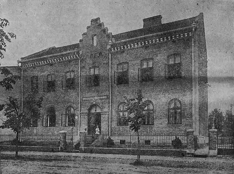 Bursa Gimnazjalna im. Adama Mickiewicza w Stryju (1904)